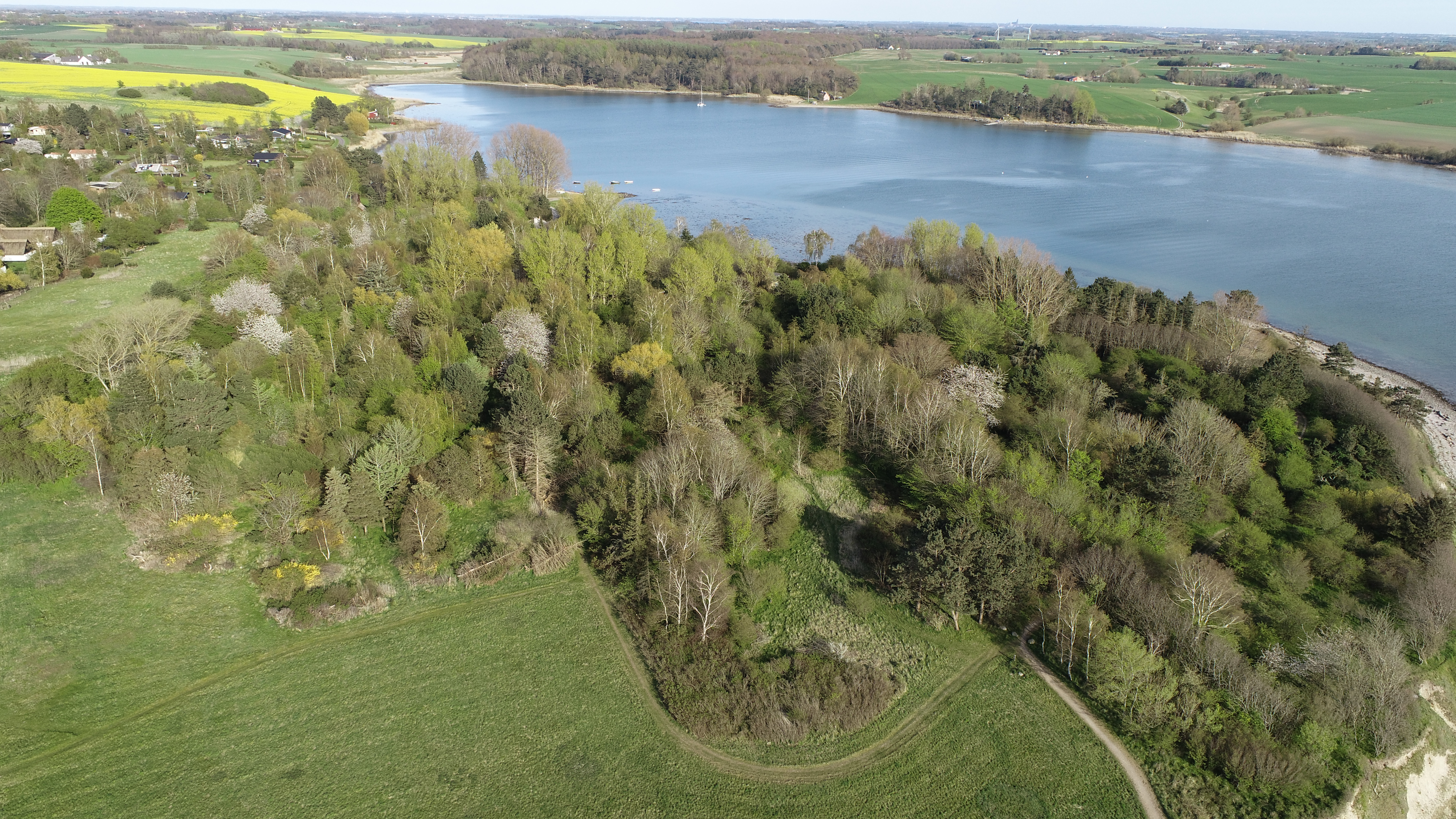 Luftfoto år 2020 af Professionel Droneflyvning som viser den gamle Campingplads, som i dag er et naturområde. I baggrunden ses Vellerup Vig